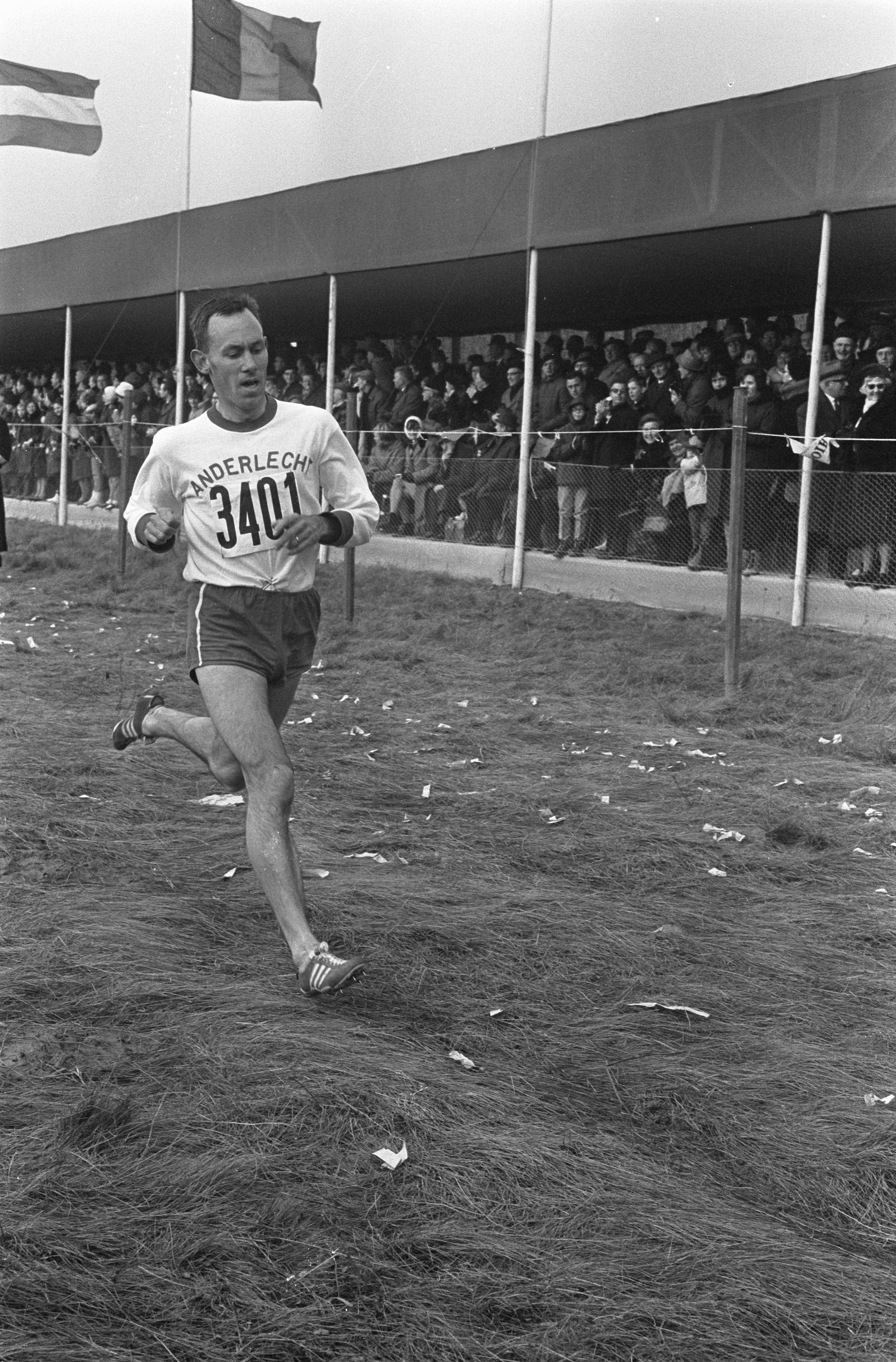 Collectie / Archief : Fotocollectie Anefo Reportage / Serie : Cross van Le Soir te Brussel Beschrijving : De Belgische loper Eugene Allonsius gaat door finish Datum : 11 november 1966 Locatie : België, Brussel Trefwoorden : atleten, atletiek, sport Persoonsnaam : Allonsius, Eugene Fotograaf : Eric Koch / Anefo Auteursrechthebbende : Nationaal Archief Materiaalsoort : Negatief (zwart/wit) Nummer archiefinventaris : bekijk toegang 2.24.01.05 Bestanddeelnummer : 919-7812